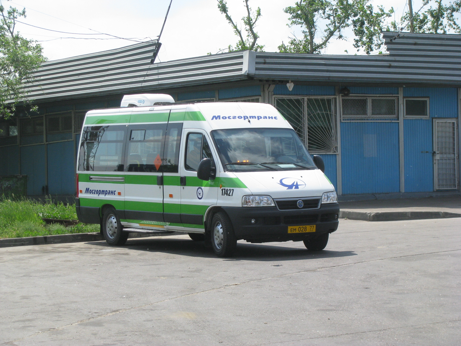 FIAT Ducato № 17427, к/ст "Бирюлёво-Западное"